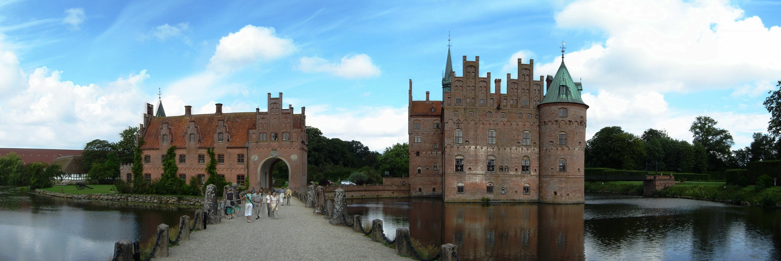 Slot Egeskov, Denemarken